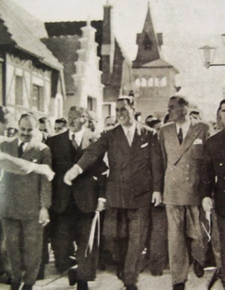 República de los Niños. El presidente argentino, Gral Juán Domingo Perón recorre el predio durante la inauguración.